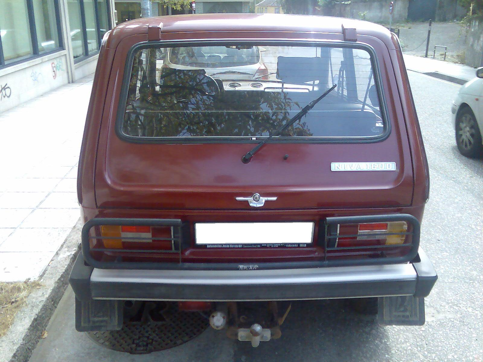 VISTA TRASERA LADA NIVA ANTERIOR A 1993